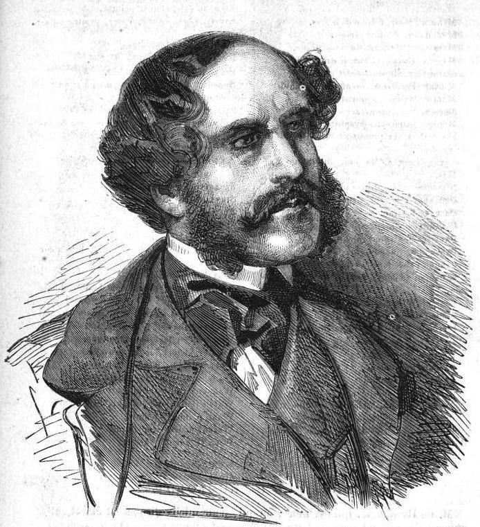 Alfred Dedreux